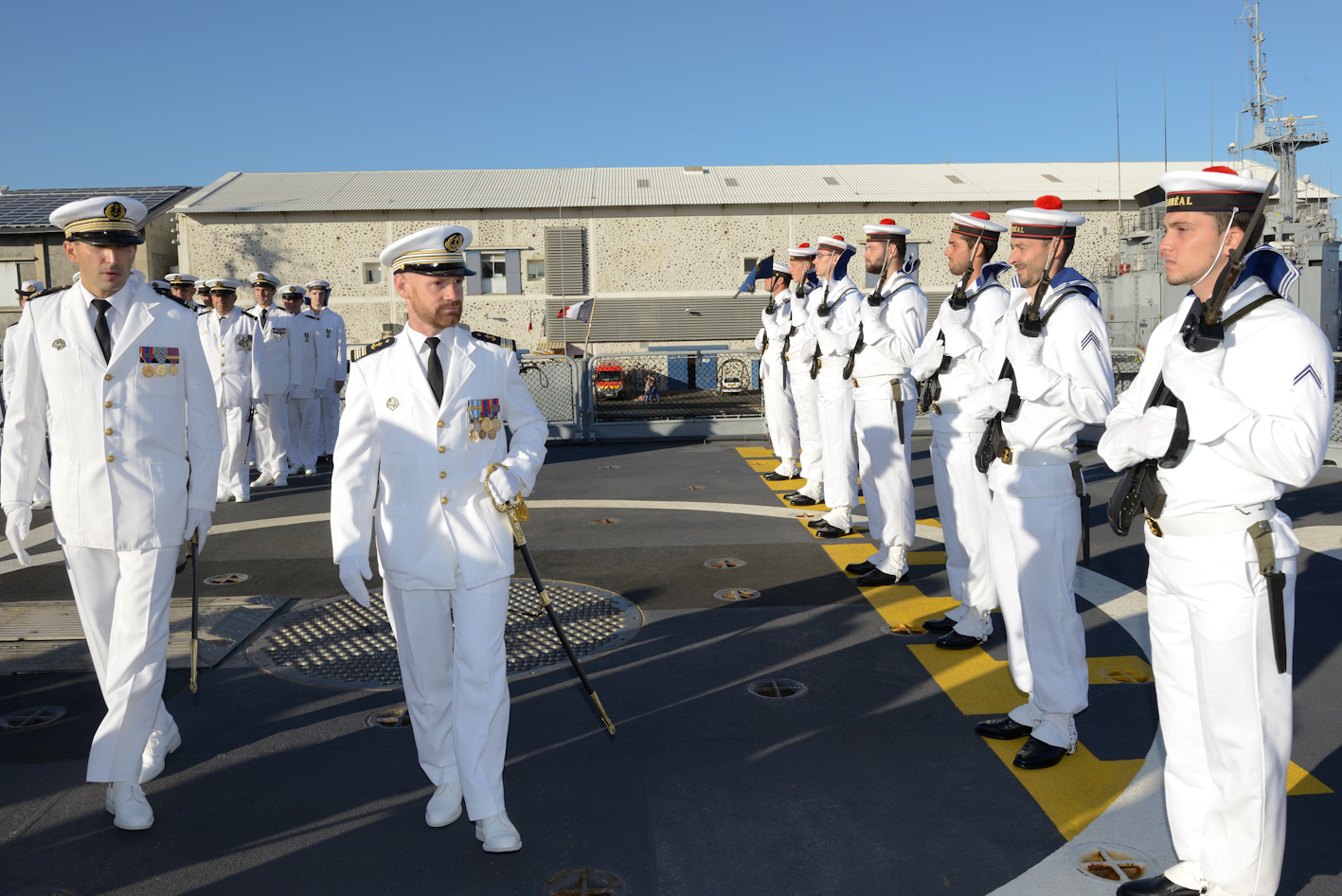 equipage